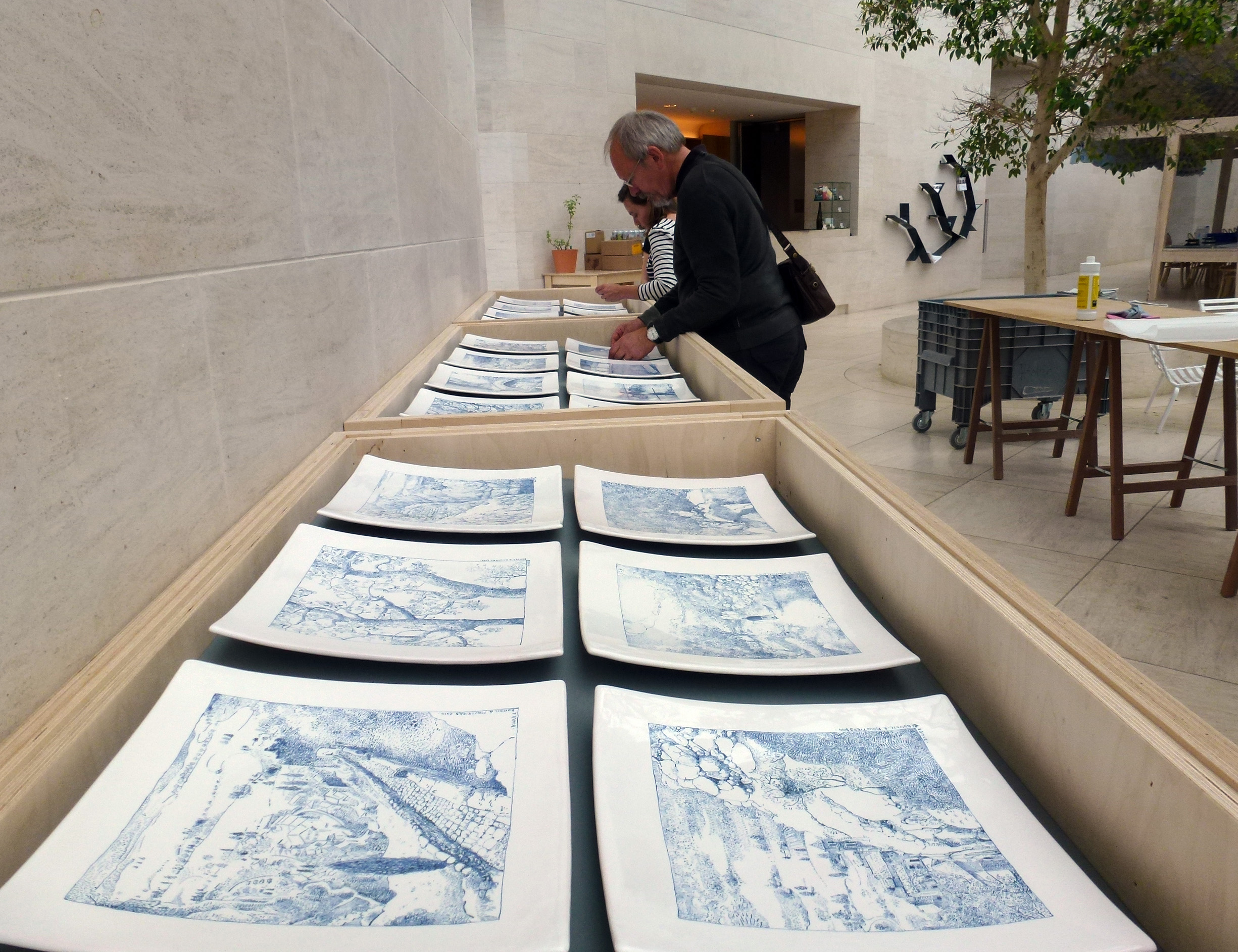 Jean-Marie Biwer: «Faïences de Moustiers», Musée d'art moderne Grand-Duc Jean MUDAM, 20/05/2015 - 15/11/2015.